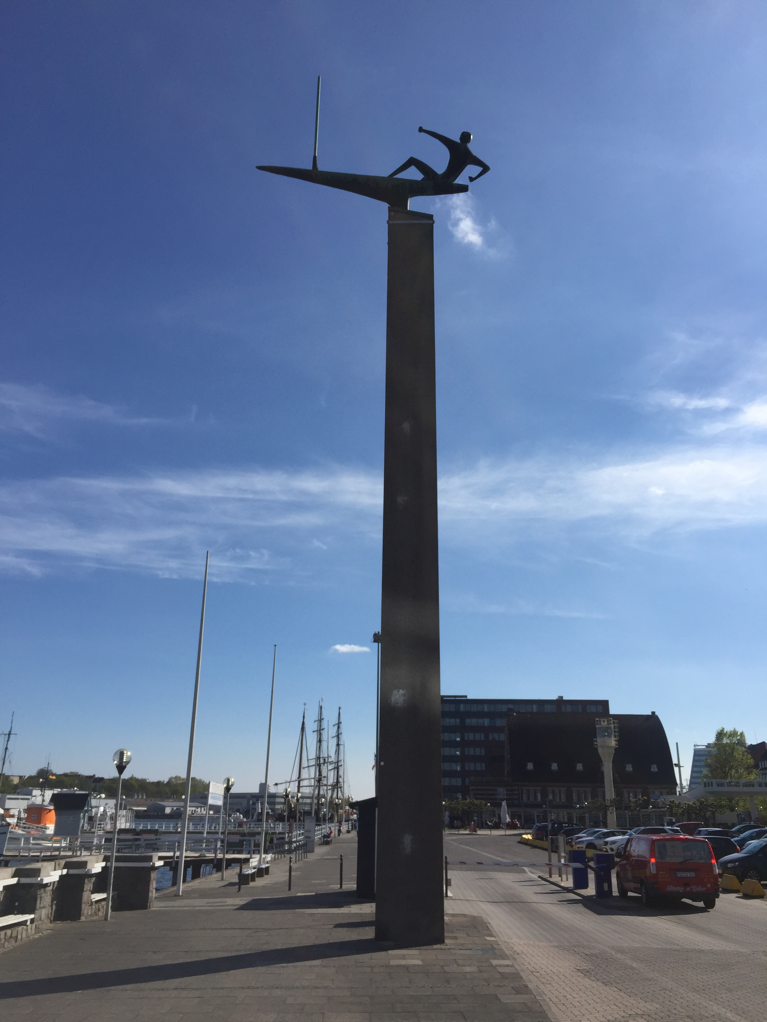 Skulptur "Der Segler" Karlheinz Goedtke (1962) Kiel